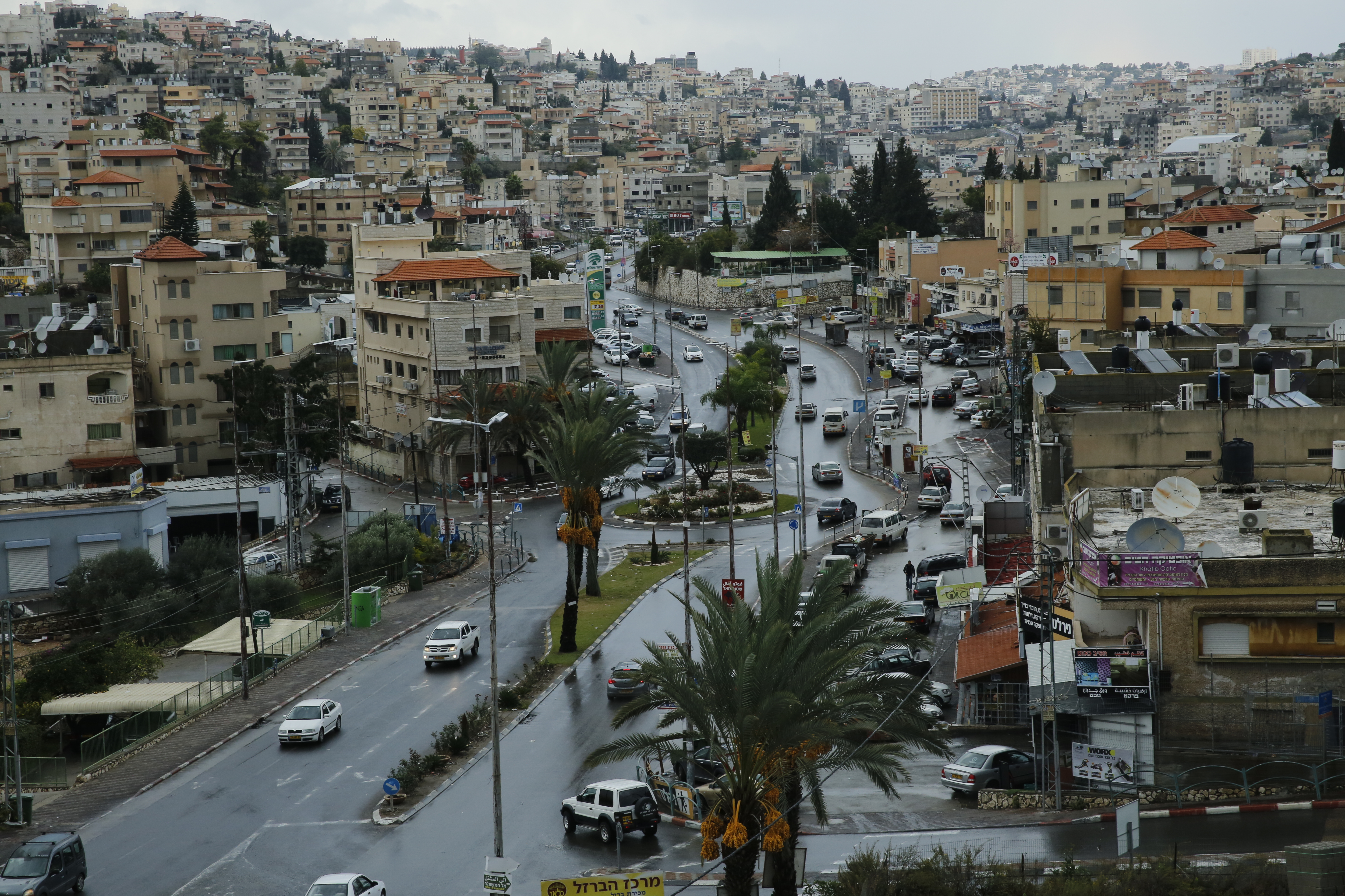 כביש נצרת חיפה - כפר יפיע